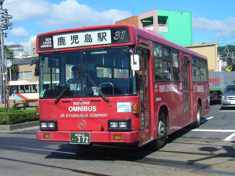 登録番号 鹿児島22き・372 ジェイアール九州バス(JR kyushu bus)鹿児島支店所属 北薩線用